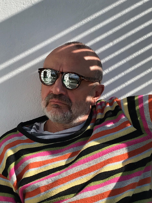 Foto: Eka Tewes